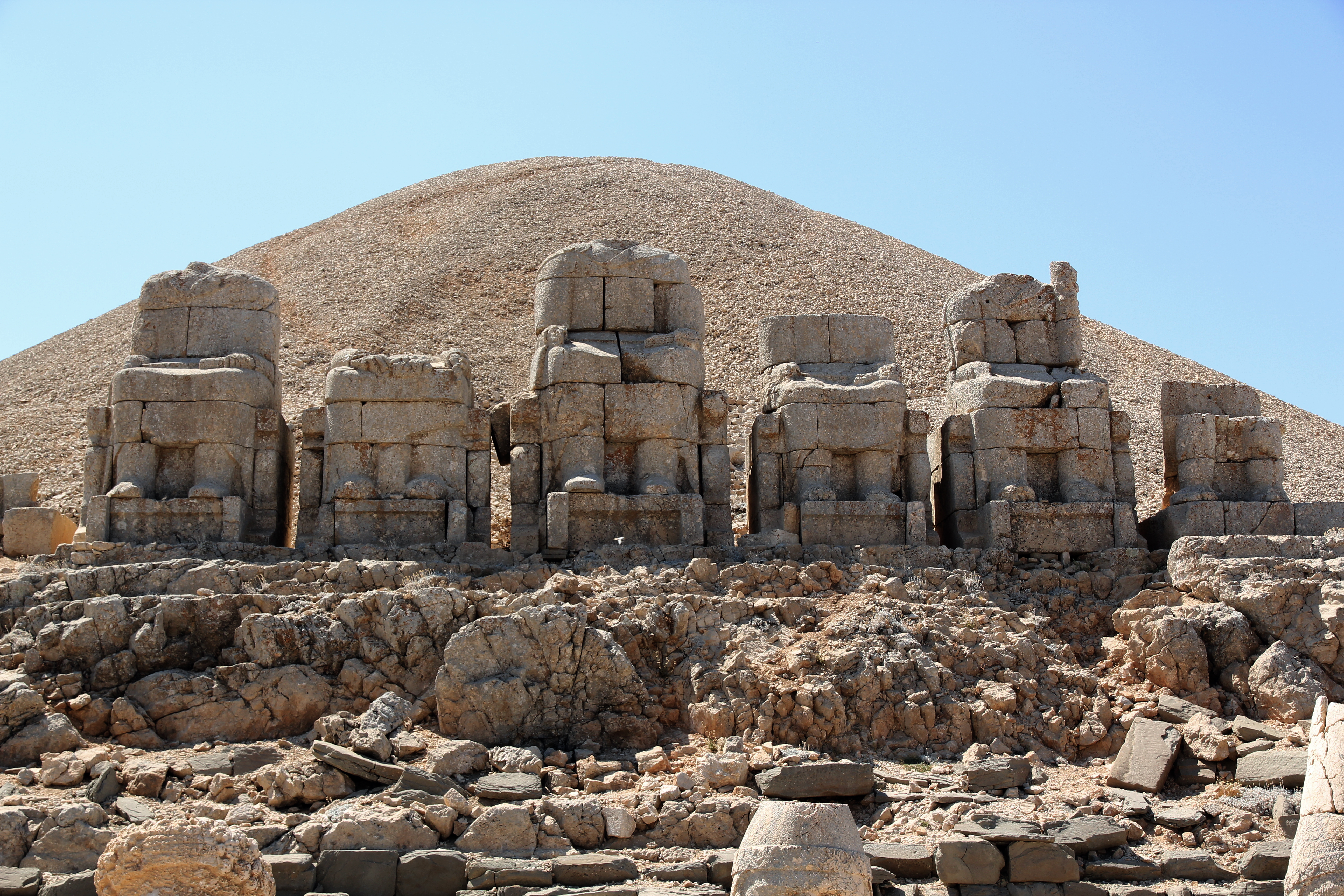 Throne der Monumentalstatuen, Nemrut Dağı, Südosttürkei, Ostterrasse